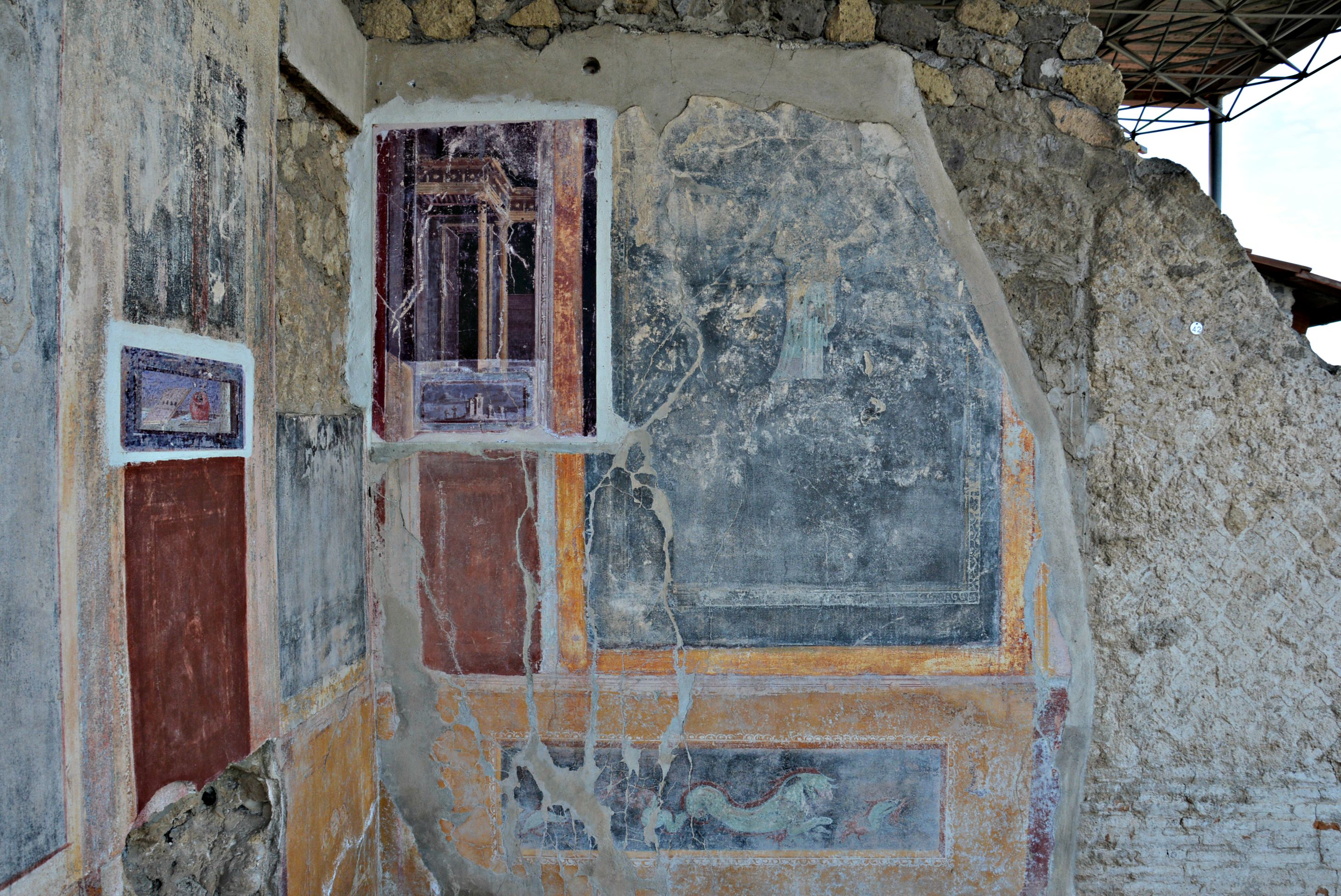 Secondo Complesso, Stabia - MIBAC This is a photo of a monument which is part of cultural heritage of Italy.